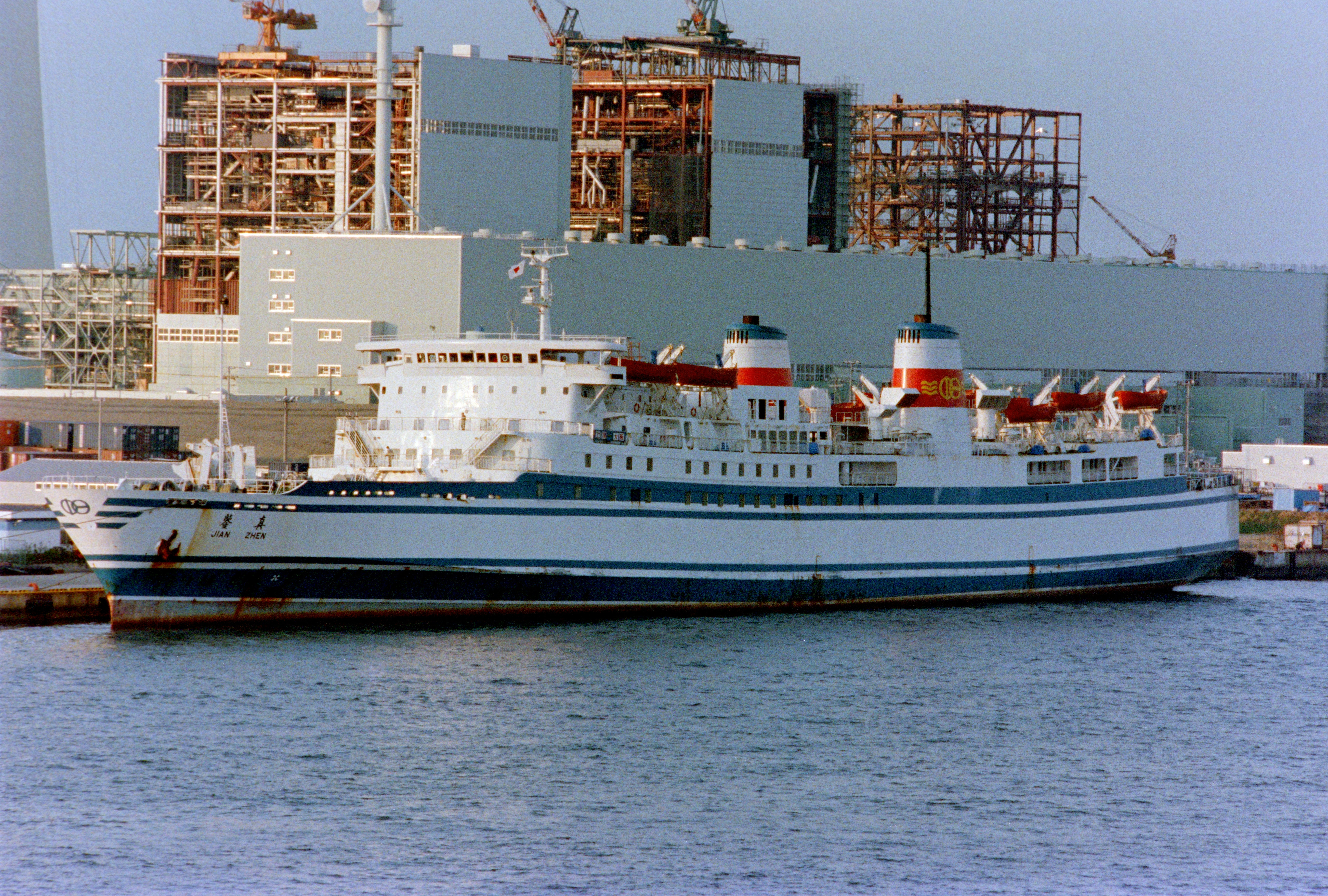 大阪南港に停泊中の中日国際輪渡のRORO貨客船・鑑真。もと有村産業の大阪－沖縄航路の高速フェリー・飛龍。